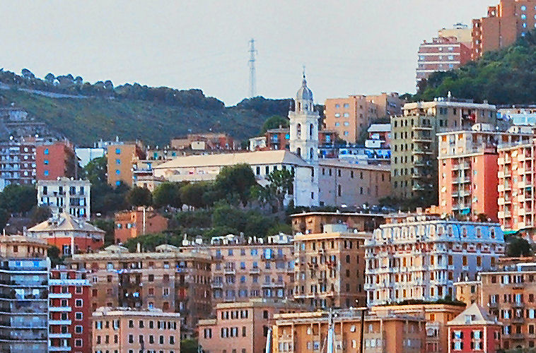 Genova, il santuario di S. Francesco da Paola visto dal porto (immagine derivata dal file:Genoa pano 2009 ii.jpg già presente su Commons)